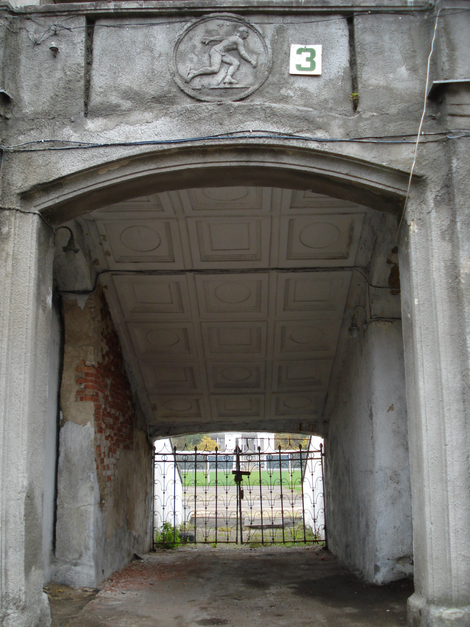 Žalgiris Stadium in Vilnius. Build in 1950